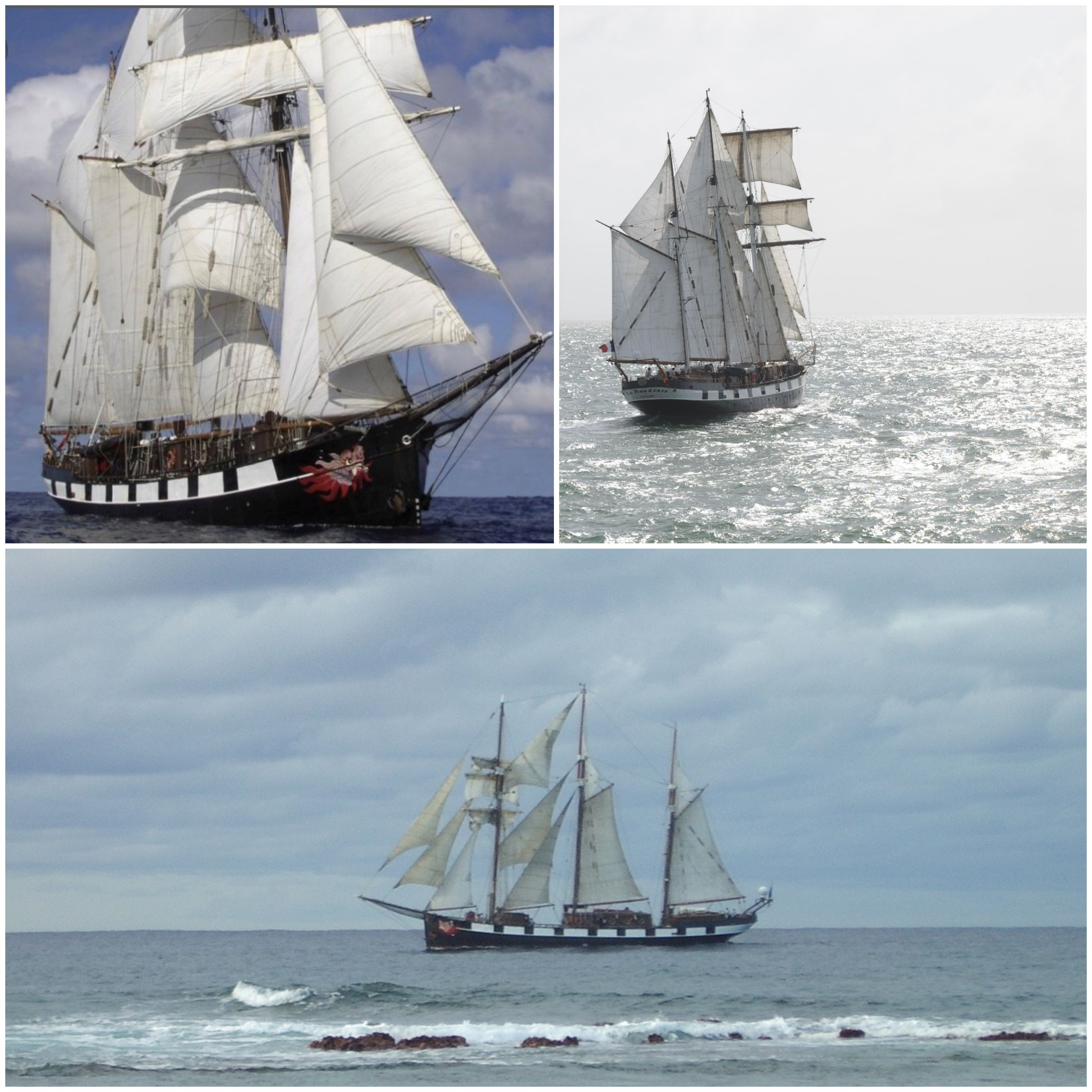 La Boudeuse